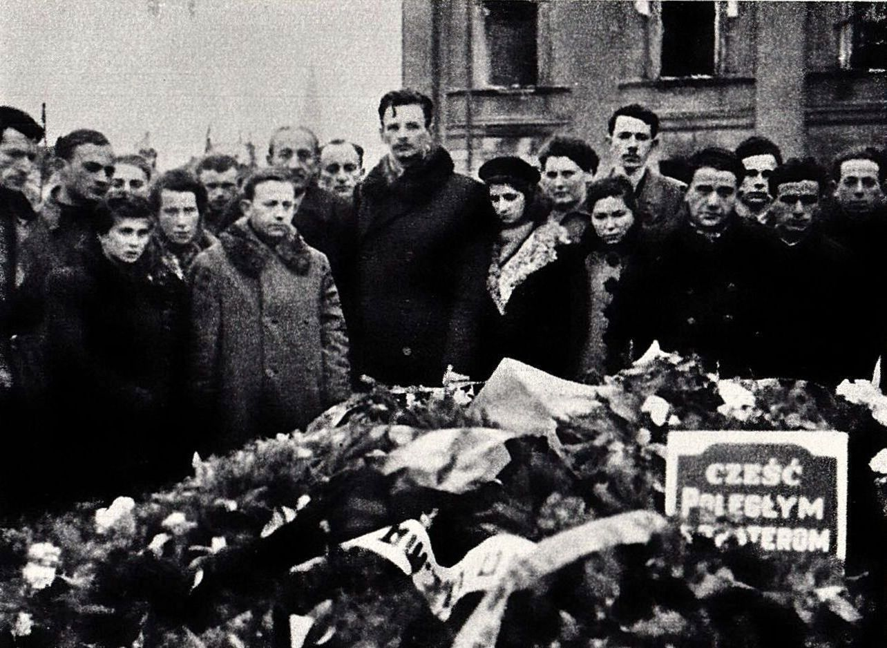 Uroczystość 19 kwietnia 1945, w drugą rocznicę powstania w getcie, przy prowizorycznej tablicy Cześć poległym bohaterom getta w pobliżu kompleksu Koszar Gwardii Koronnej (Koszar Wołyńskich). Wśród zebranych Icchak "Antek" Cukierman (w środku)